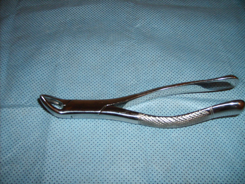 Fórceps n. 151 - utilizado em odontologia